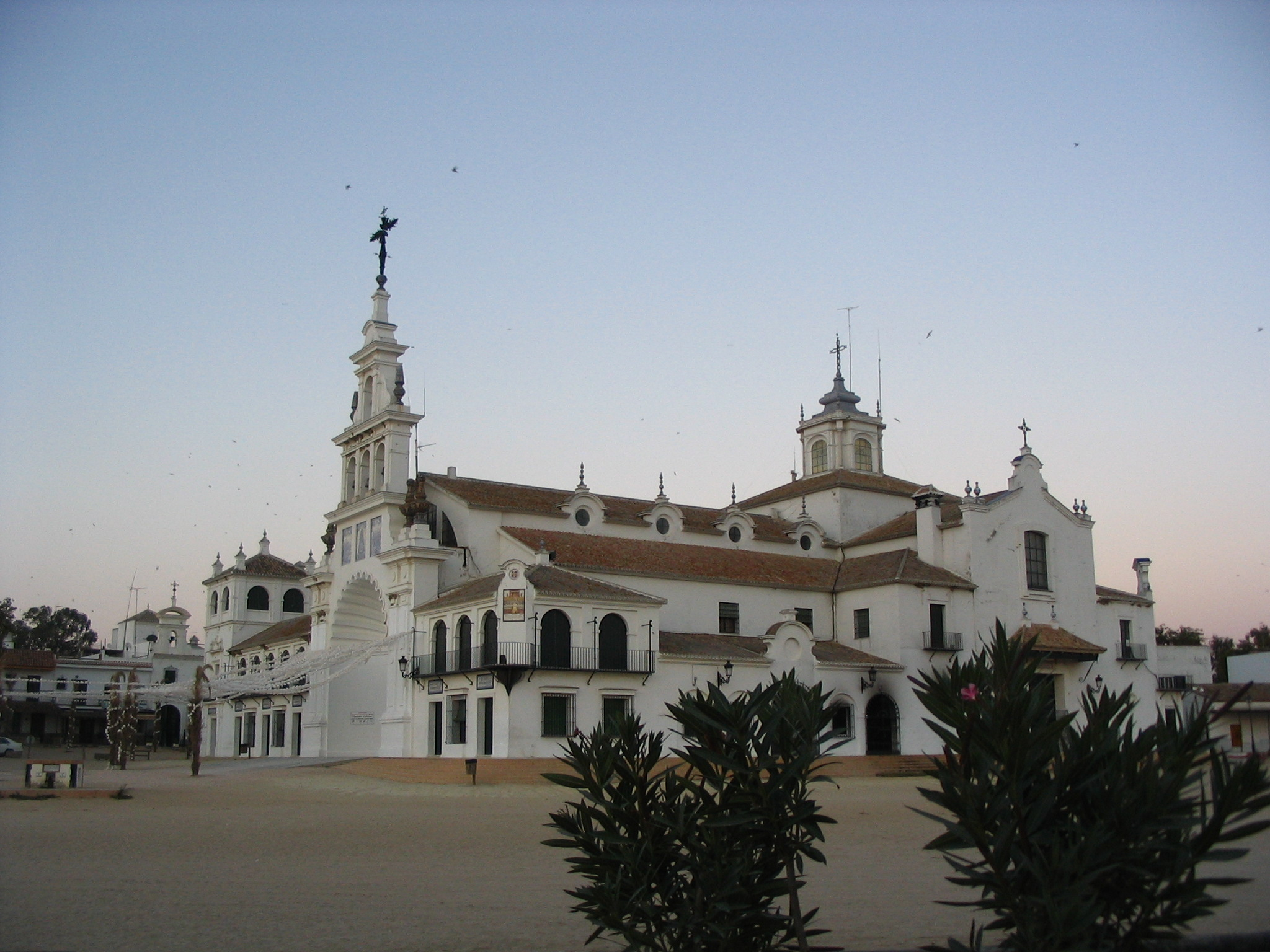 Picture taken by me. es: Ermita del Rocío, lateral, Huelva (España). Chapel of Rocío, lateral, Huelva (Spain).